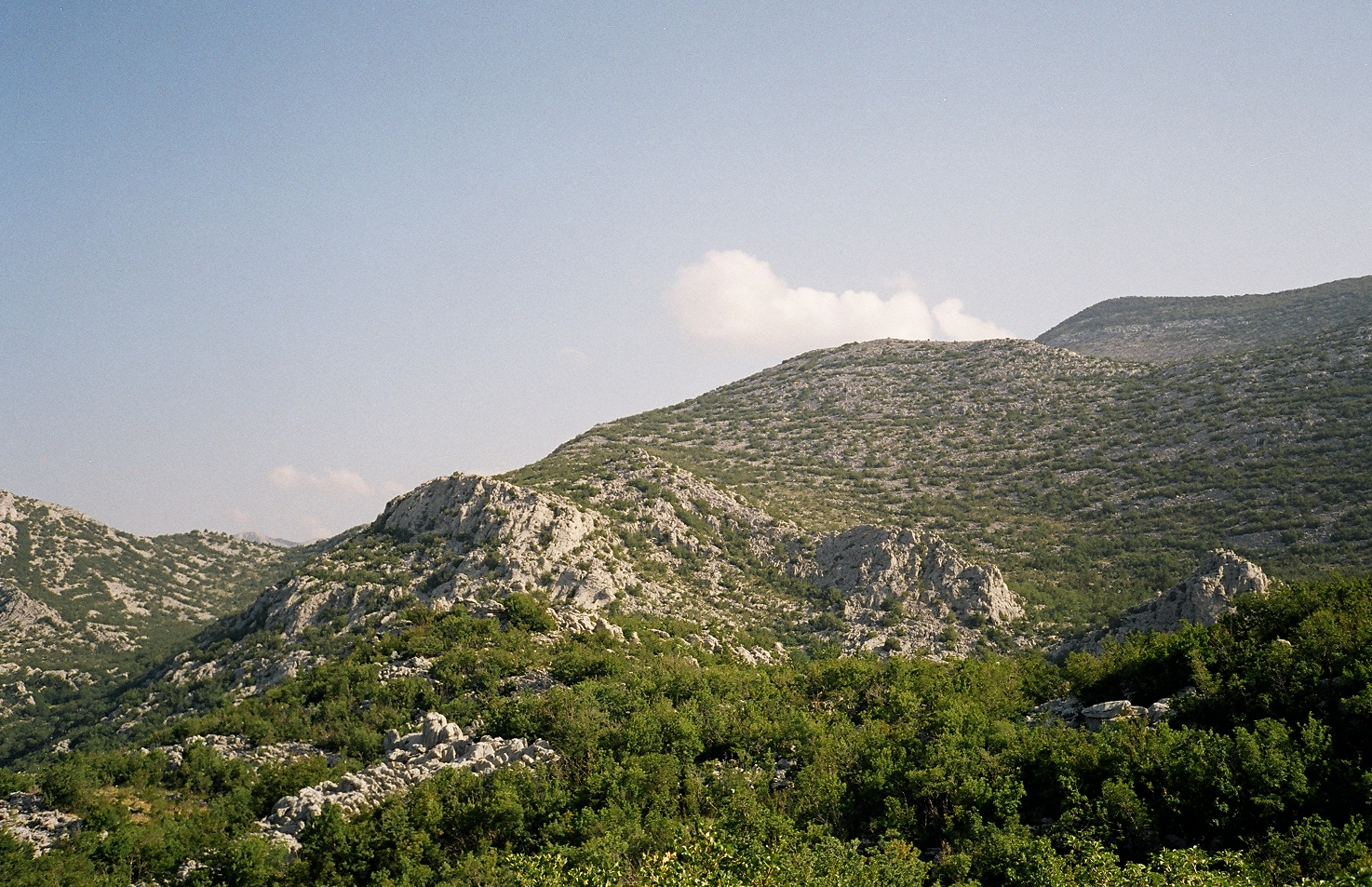 Velebit/Velebitas